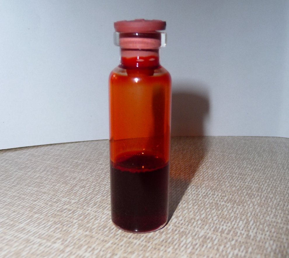 Ammonia solution of Congo Red / Аммиачный раствор Конго красного